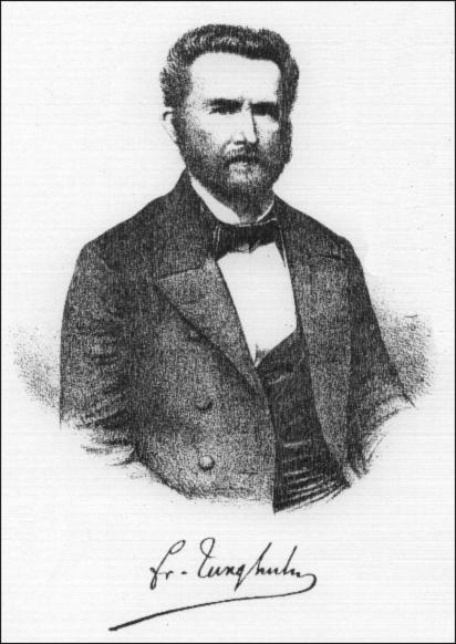 Franz Junghuhn. Titelbild aus "Licht- und Schattenbilder ..."